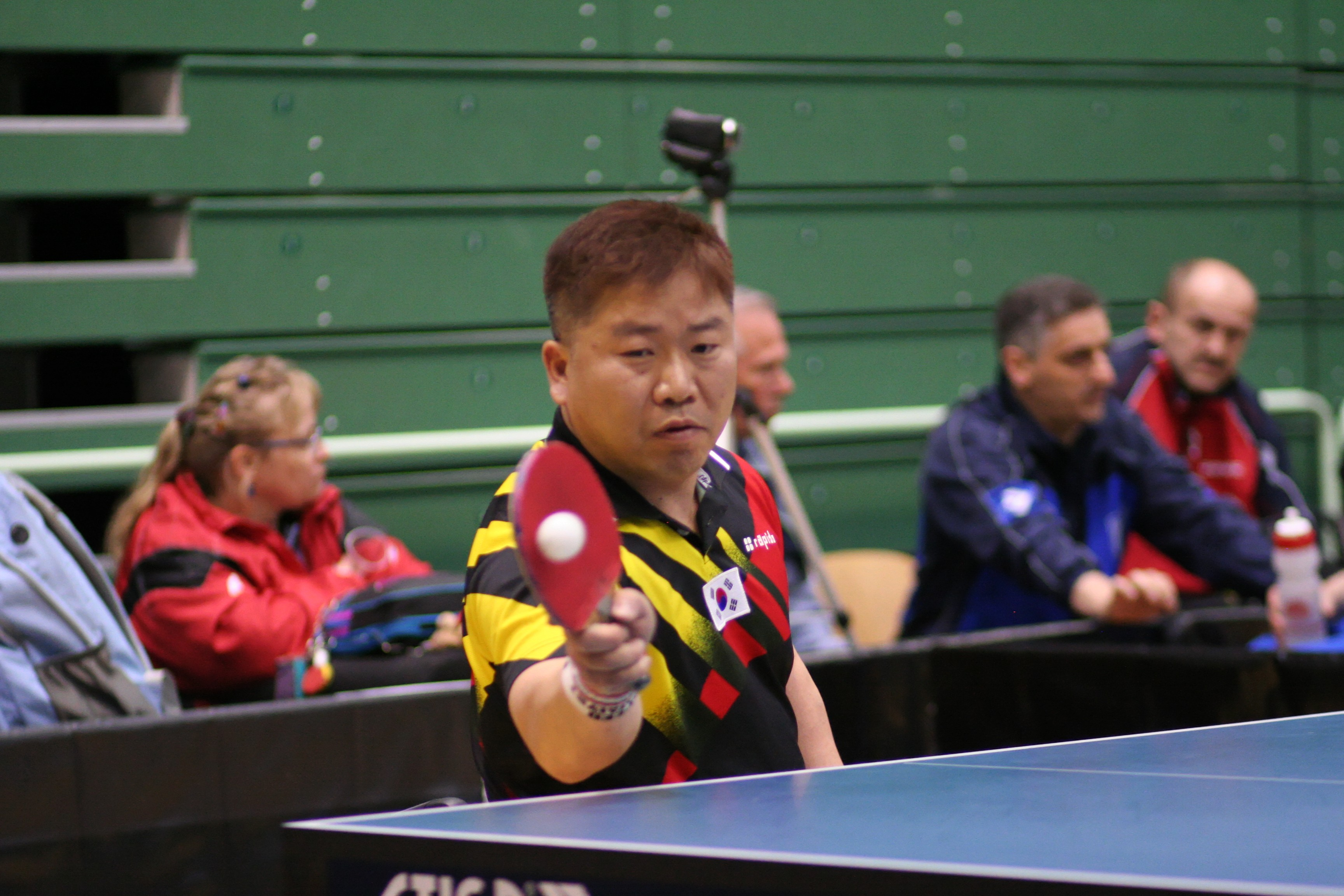 Eun Chang Jung (KOR)